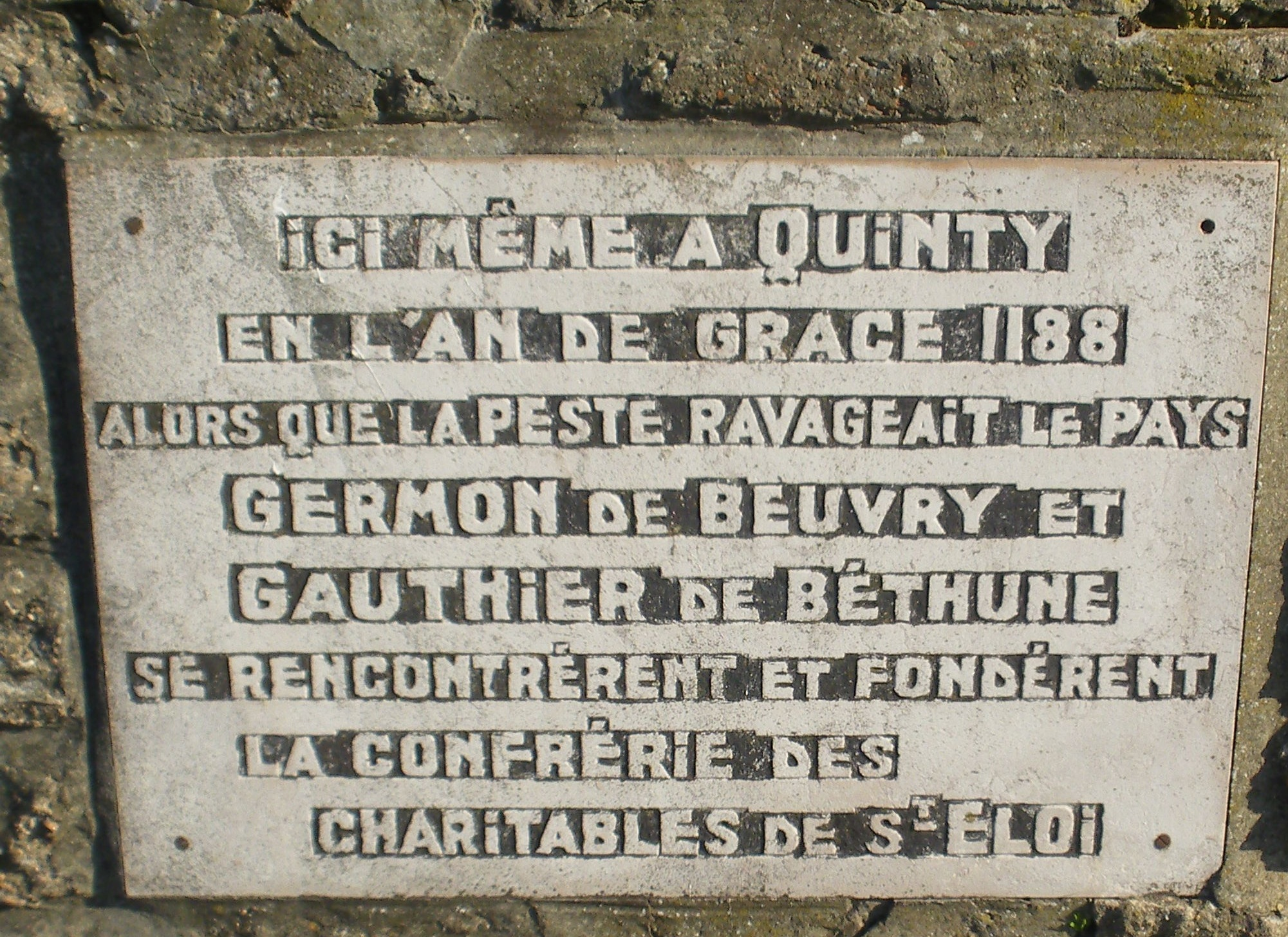 Plaque indiquant la création de la confrérie des Charitables de Saint-Eloi. Situé à l'entrée du Parc du Quinty.